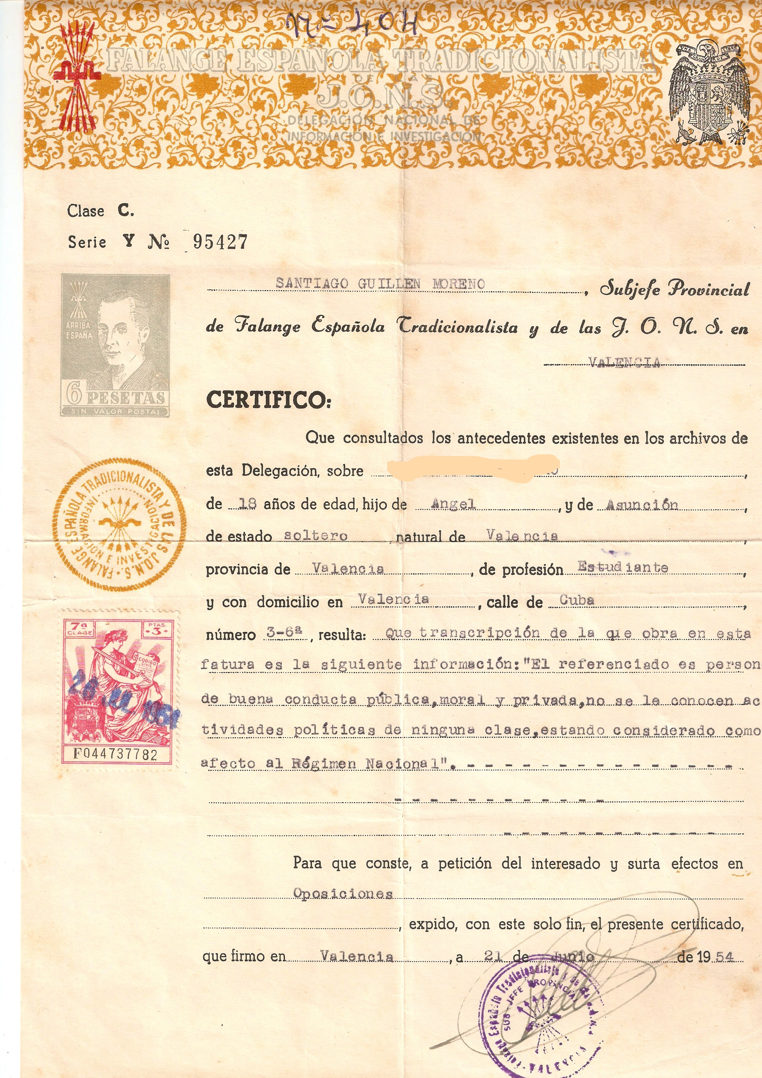 Certificado de conducta expedido por el responsable local de FET y de las JONS.